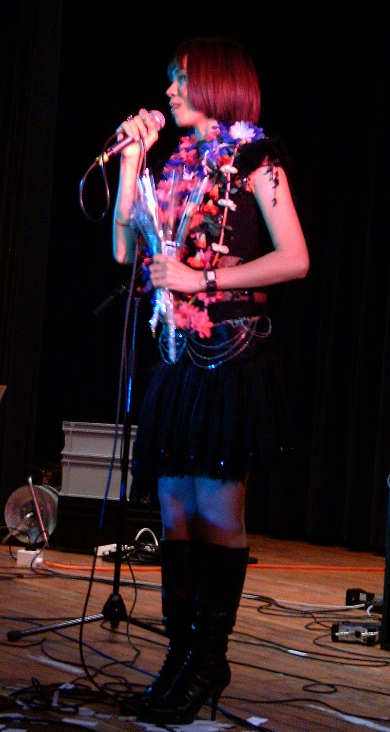 Jintara Poonlap at Saiyai Thai-German Fest Oberhausen/Germany